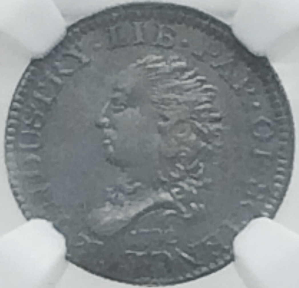 1792 half disme obverse